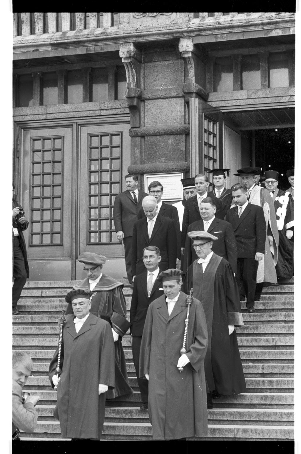 Umzug der Professoren und Gäste aus aller Welt vom Stadttheater zum Festgottesdienst in der Nikolaikirche, hier auf der Treppe vom Stadttheater zur Rathausstraße. In der zweiten Reihe CAU-Rektor Prof. Dr. Wolfgang Bargmann (links), Landeskultusminister Claus Joachim von Heydebreck (Bildmitte) und Universitätsprediger Prof. Dr. Georg Hoffmann (rechts).